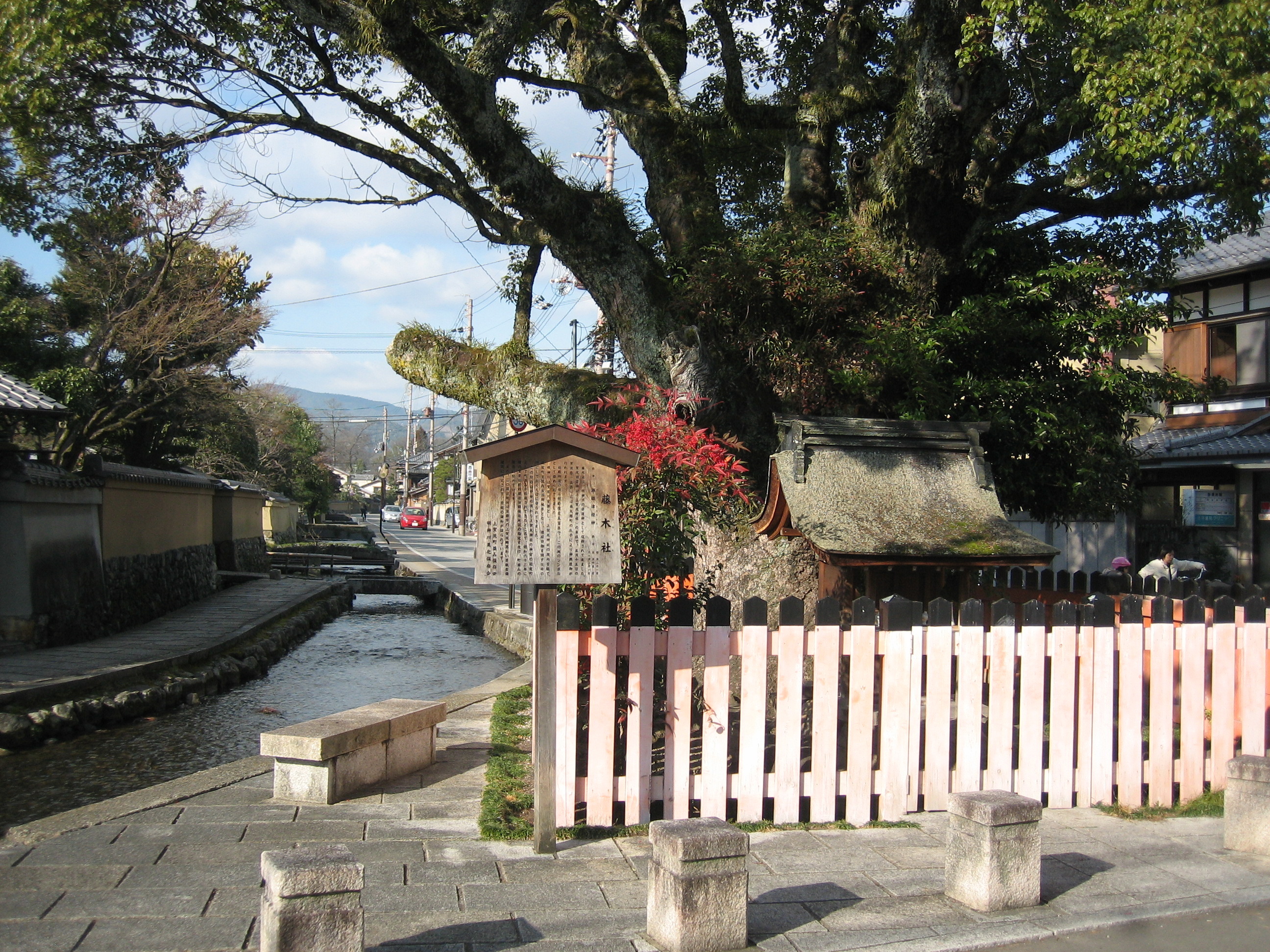 藤木社を京都市北区上賀茂藤ノ木町から撮影